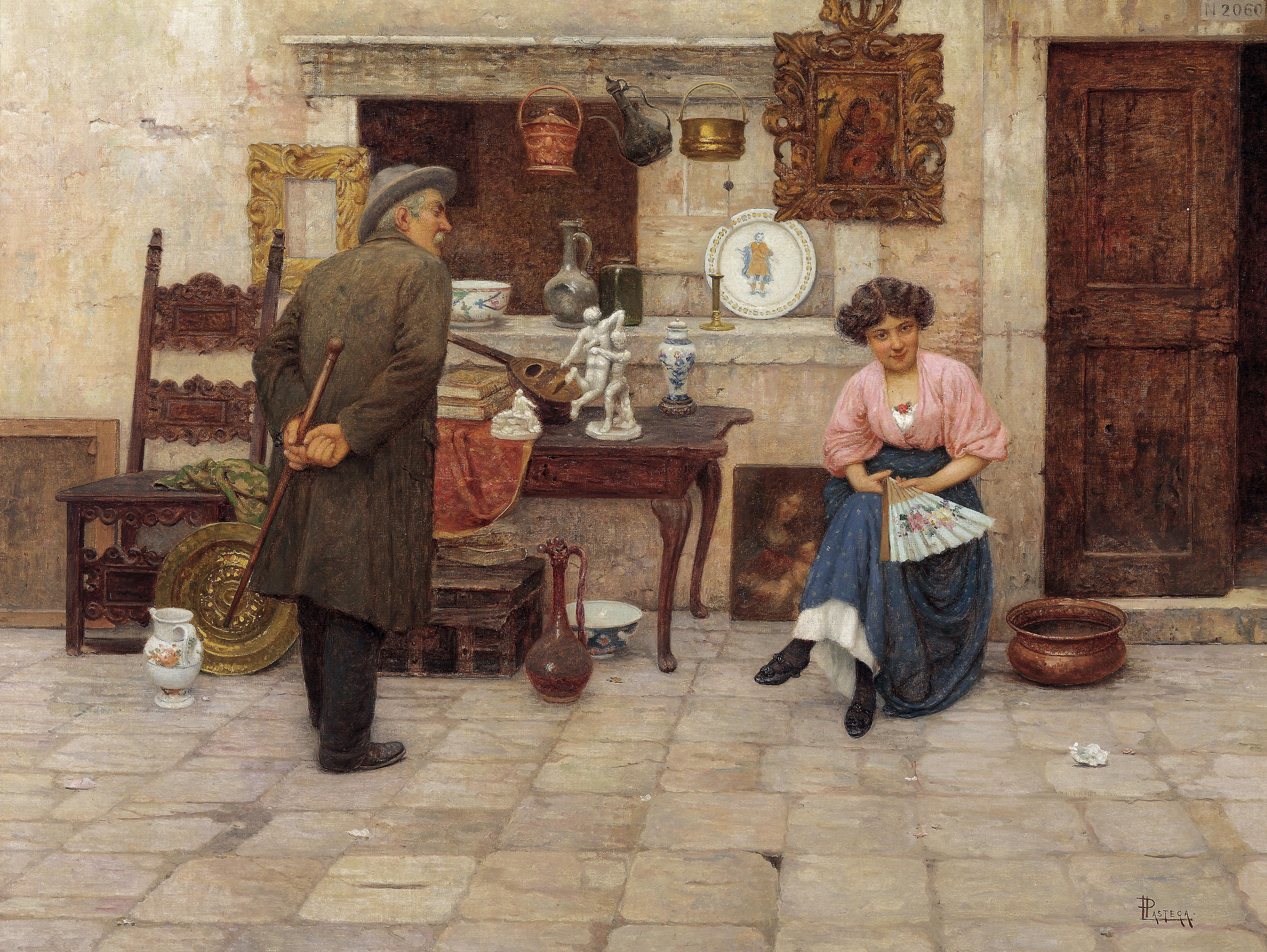 Der Kunstliebhaber